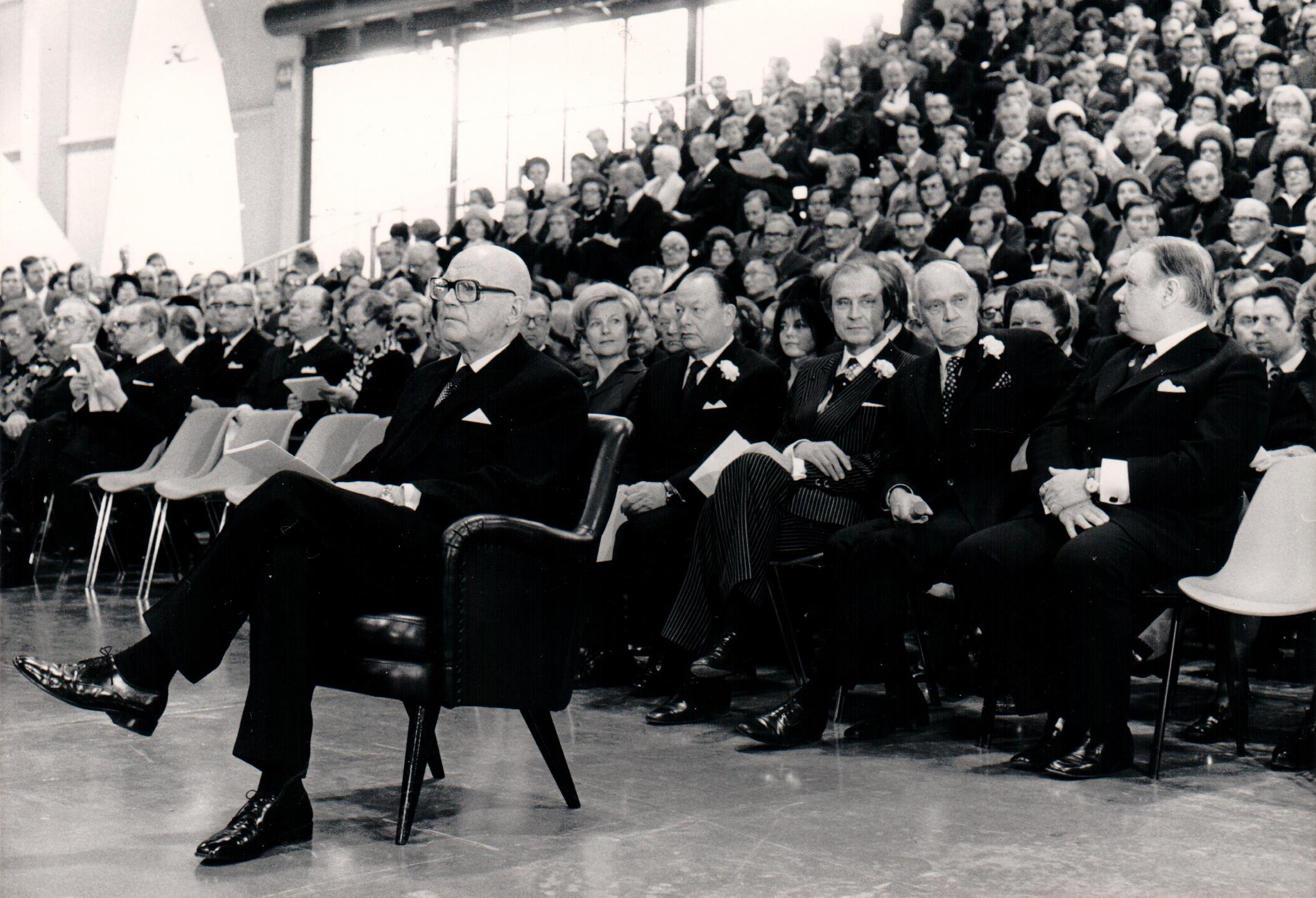 Presidentti Urho Kekkonen Messukeskuksen avajaisissa 1975.